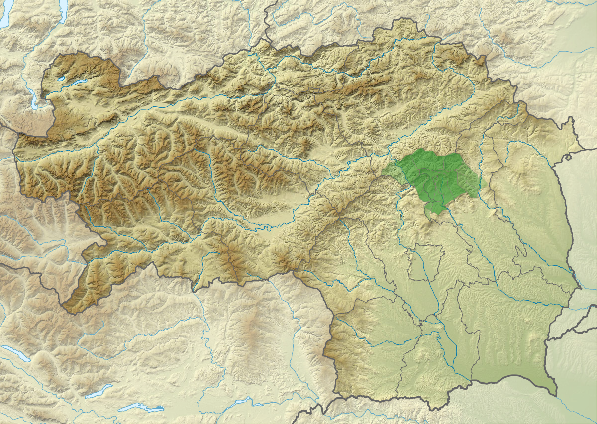 Almenland, eine Region der Steiermark dunkler: Mitgliedsgemeinden der Kleinregion Naturpark Almenland heller: weitere Gemeinden des Gemeindeverbands Almenland weiter aufgehellt: die Gemeindegebiete westlich der Mur (westliche Grazer Berge) und östlich der Flatnitz (Joglland), die nicht zum Almenland im eigentlichen Sinne gehören, und der Süden Neudorfs (in engeren Sinne Schöcklland).